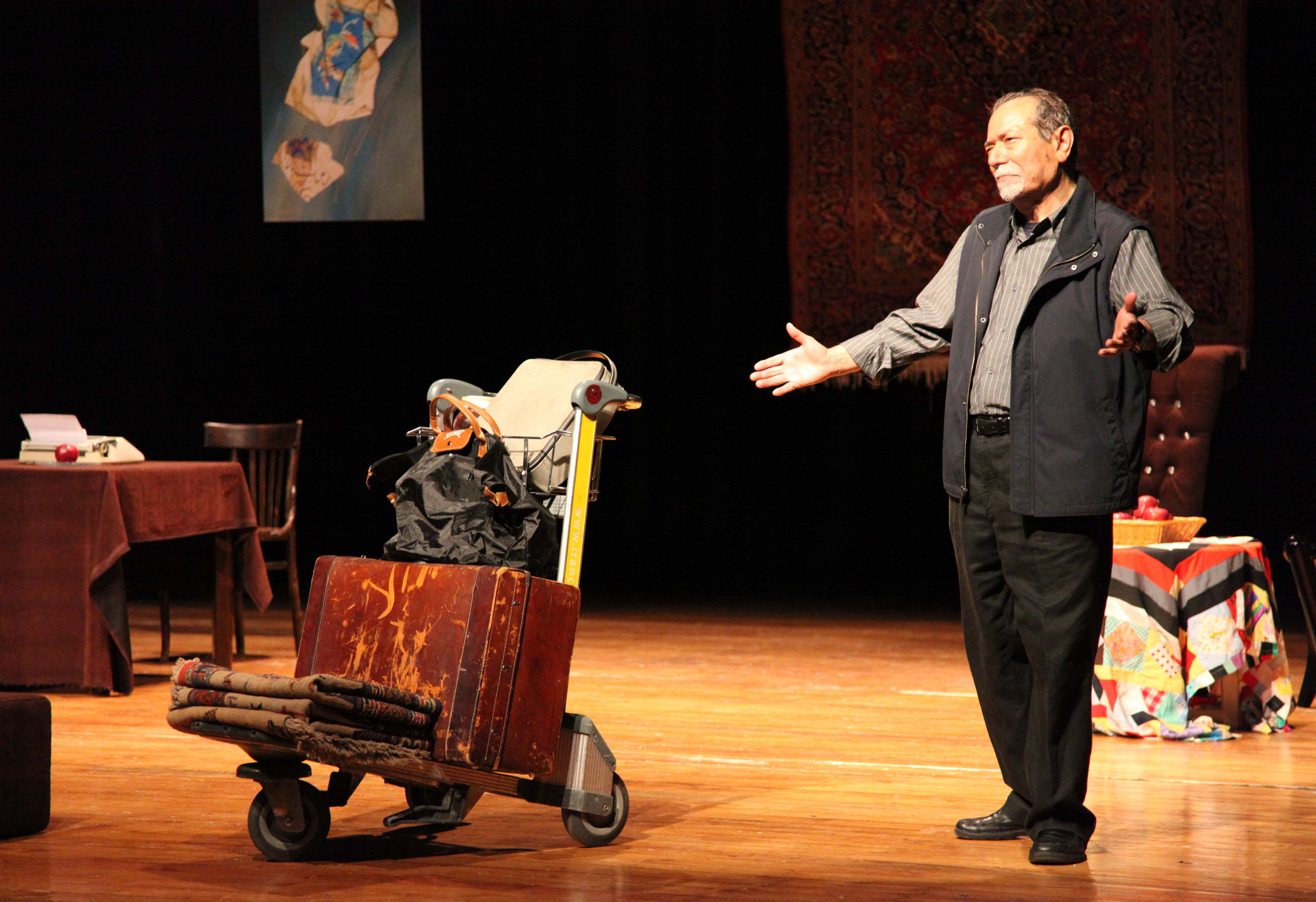 تئاتر بازیگر و زنش ۱۳۹۰